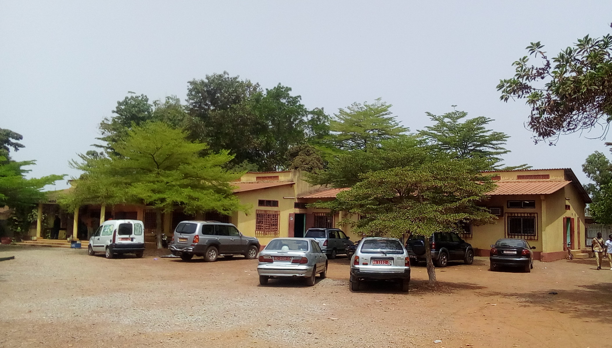 Parking de la Sous-préfecture de Kamsar This is an image with the theme "Africa on the Move or Transport" from: Guinea